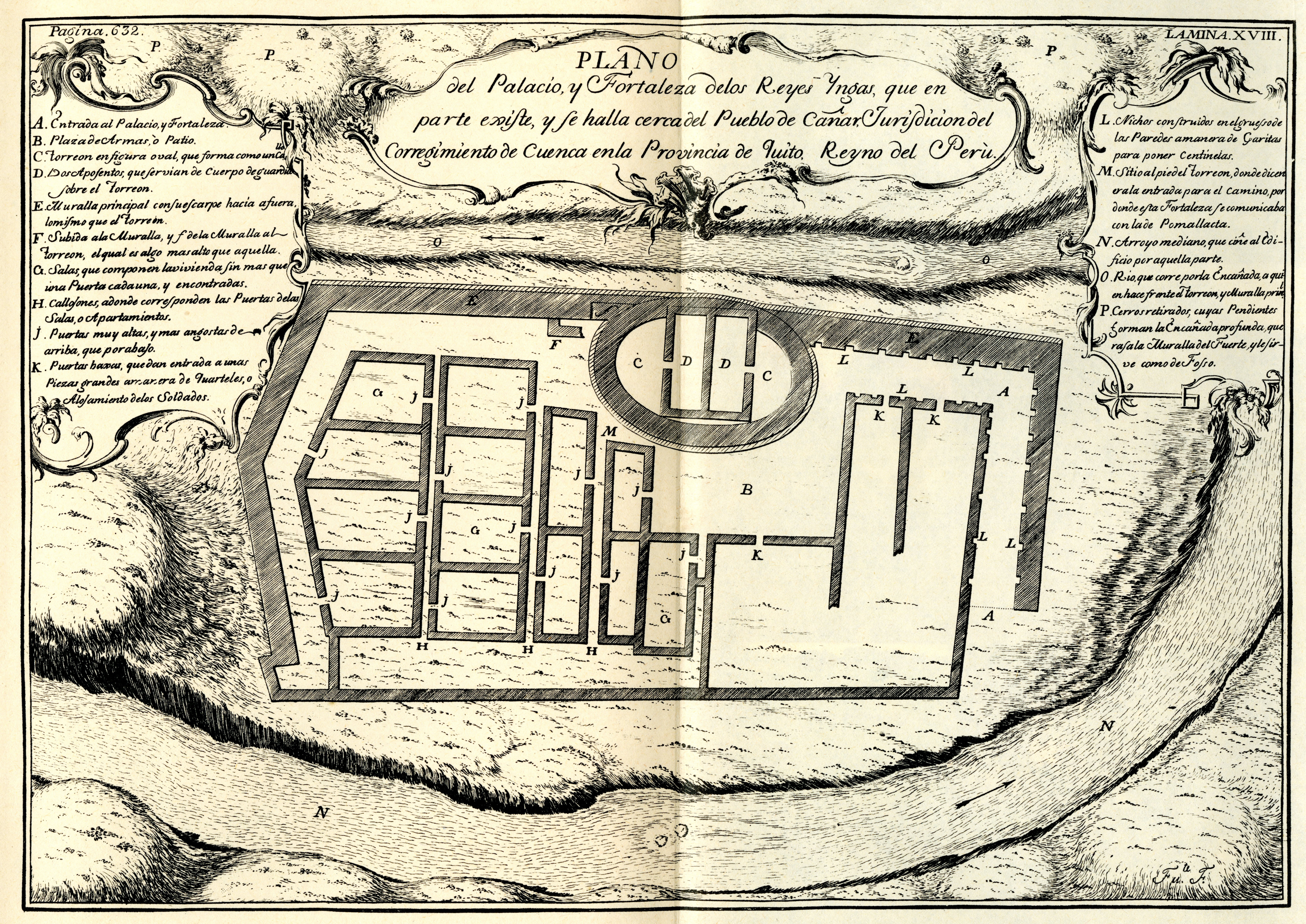 De Ulloa, Antonio y Jorge Juan. Relación Histórica del Viaje a la América Meridional, hecho de Orden de Su Majestad Católica para medir algunos Grados de Meridiano Terrestre, y venir por ellos en conocimiento de la verdadera Figura y Magnitud de la Tierra, con otras varias Observaciones Astronómicas y Físicas. Por Don Jorge Juan Comendador de Aliaga, en la Orden de San Juan, Socio correspondiente de la Real Academia de las Ciencias de París; y Don Antonio de Ulloa de la Real Sociedad de Londres: ambos por Capitanes de Fragata de la Real Armada. Primera Parte / Tomo I. Impresa por la Orden del Rey Nuestro Señor en Madrid por Antonio Marín, Año de MCDDXLVIII (1748). Diapositiva de Consulta y acceso publico cuya información fue investigada de un libro y/o ejemplar de revisión custodiado en los Fondos Bibliográficos (Sección Siglo XVIII o Etapa Colonial) del Archivo Histórico del Guayas; Guayaquil, Ecuador.Consultado y compartido por el usuario J. Javier García A.